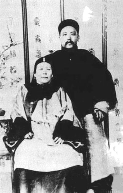 yuan shikai